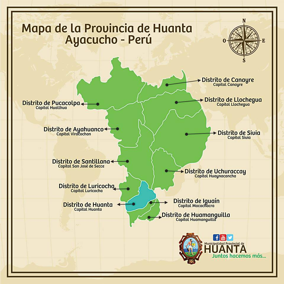 Mapa de la Provincia de Huanta 2015